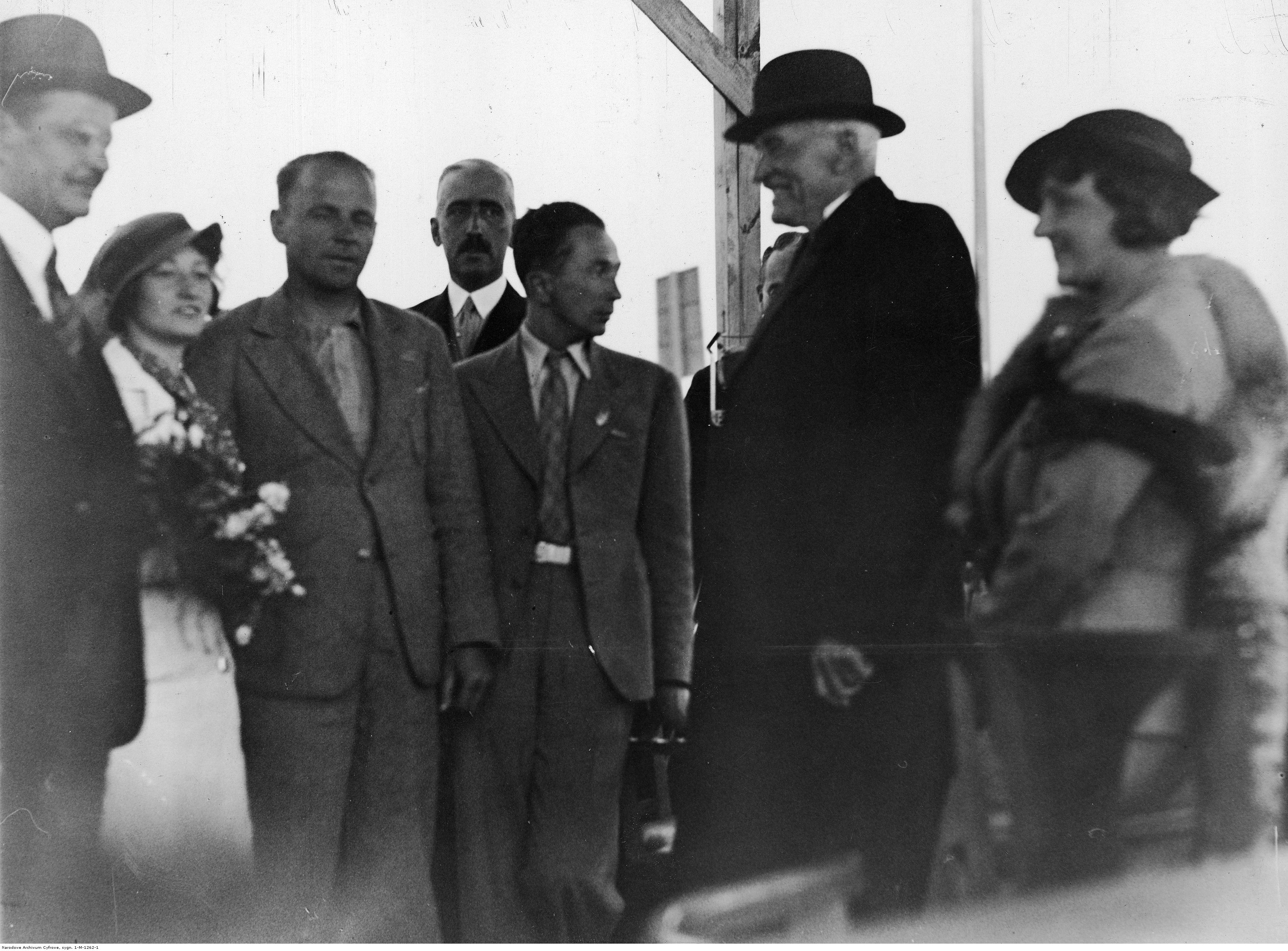 Międzynarodowe Zawody Samolotów Turystycznych (Challenge 1934) w Warszawie. Prezydent RP Ignacy Mościcki (2. z prawej) na lotnisku w rozmowie ze zwycięzcą zawodów kapitanem pilotem Jerzym Bajanem (3. z prawej) i jego mechanikiem sierżantem Gustawem Pokrzywką (3. z lewej). Widoczni m.in.: Maria Mościcka (1. z prawej), premier Leon Kozłowski (1. z lewej), prezes Aeroklubu RP książę Janusz Radziwiłł (4. z lewej). Koncern Ilustrowany Kurier Codzienny - Archiwum Ilustracji. Sygnatura: 1-M-1262-1